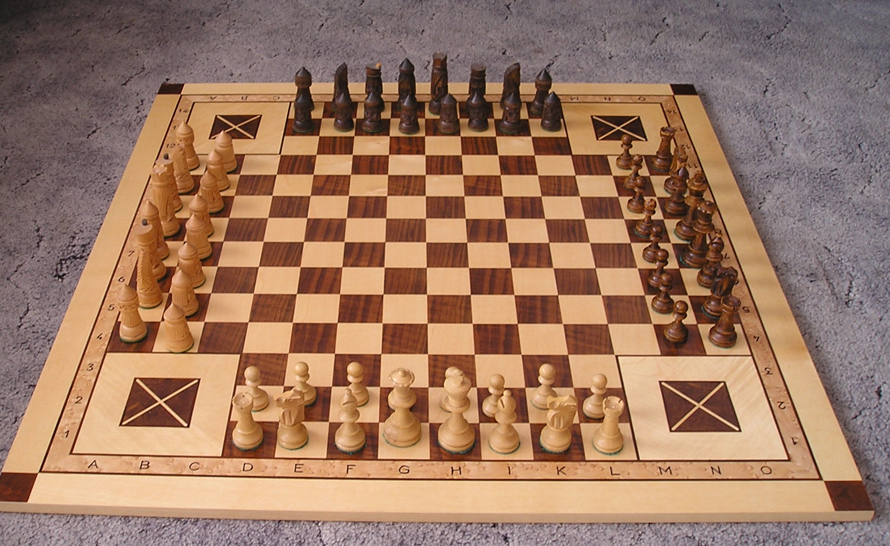 Vier-Personen-Schach